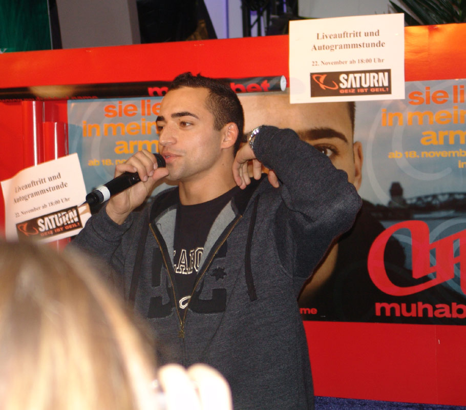 Muhabbet in Berlin Steglitz Saturn